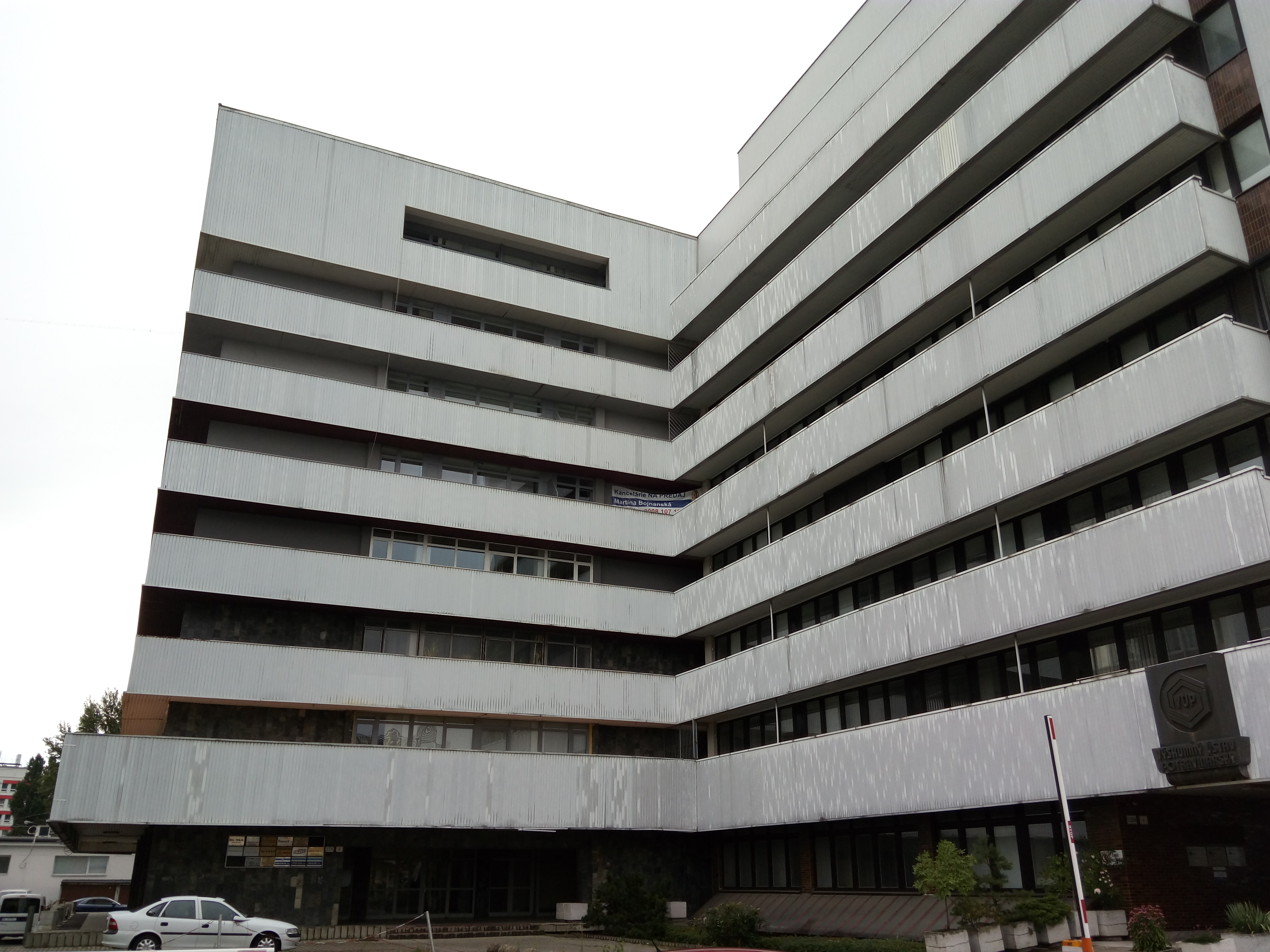 Priemyselná, Ružinov, Bratislava